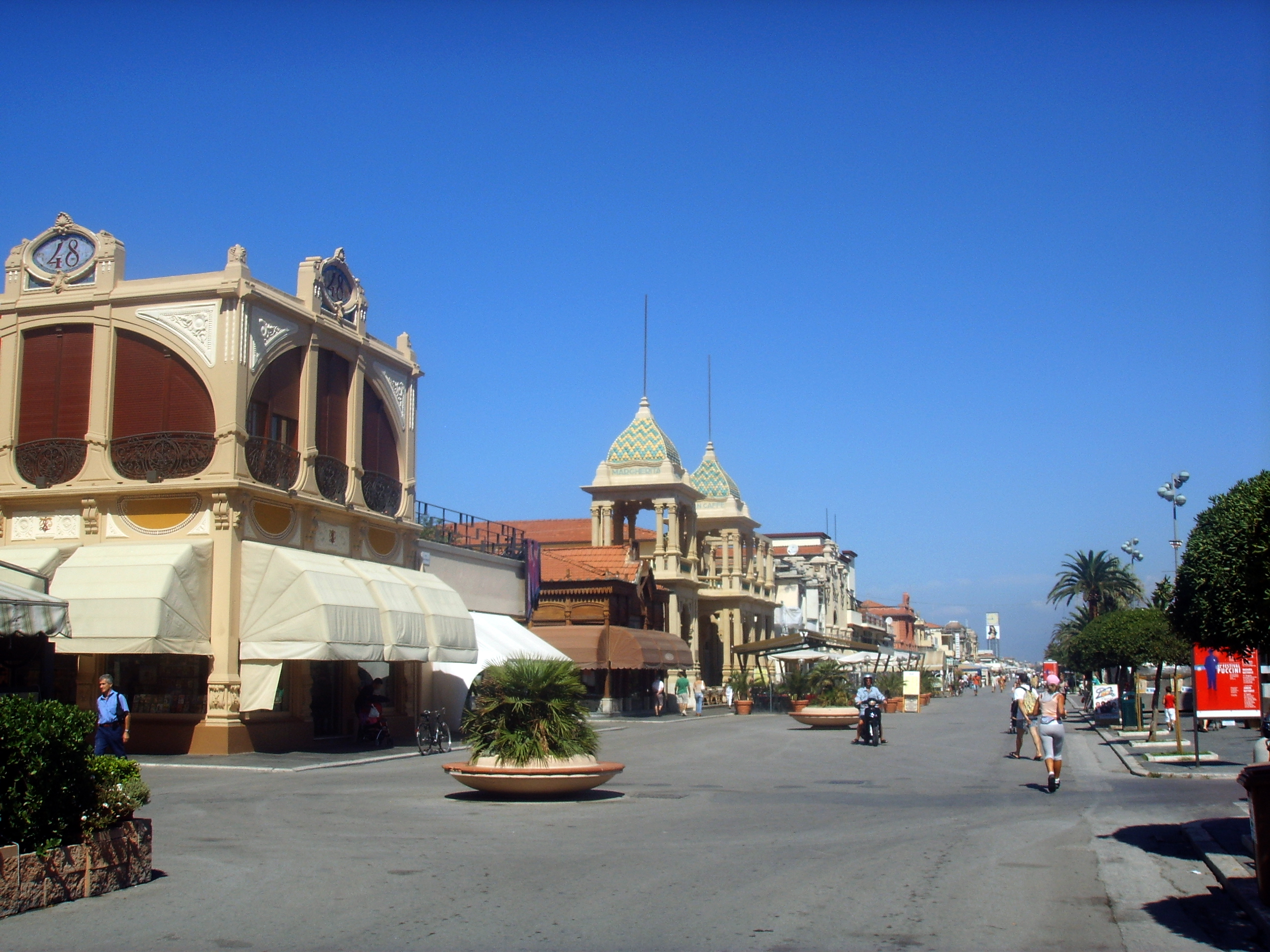 Viareggio, passeggiata_a_mare in Viareggio, italy